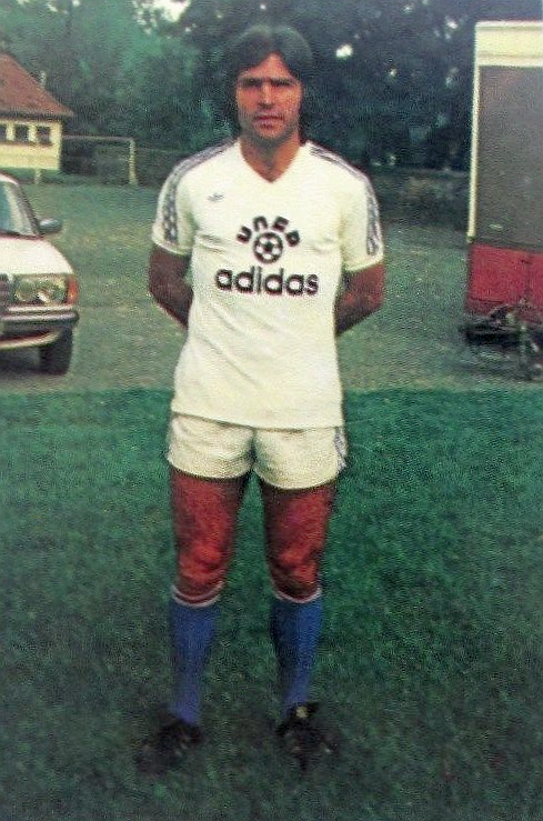 Jacky Vergnes en 1978 (RC Strasbourg), 'Football 78', Panini figurina n°365.